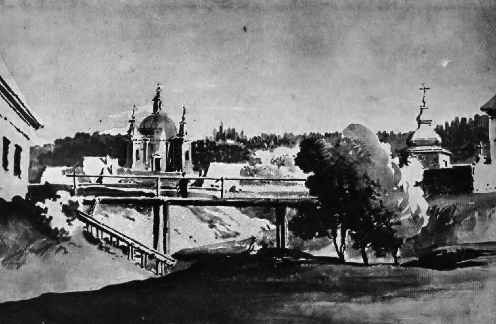 Беларуская (тарашкевіца): Вільня (Vilnia), Антокаль (Antokal)